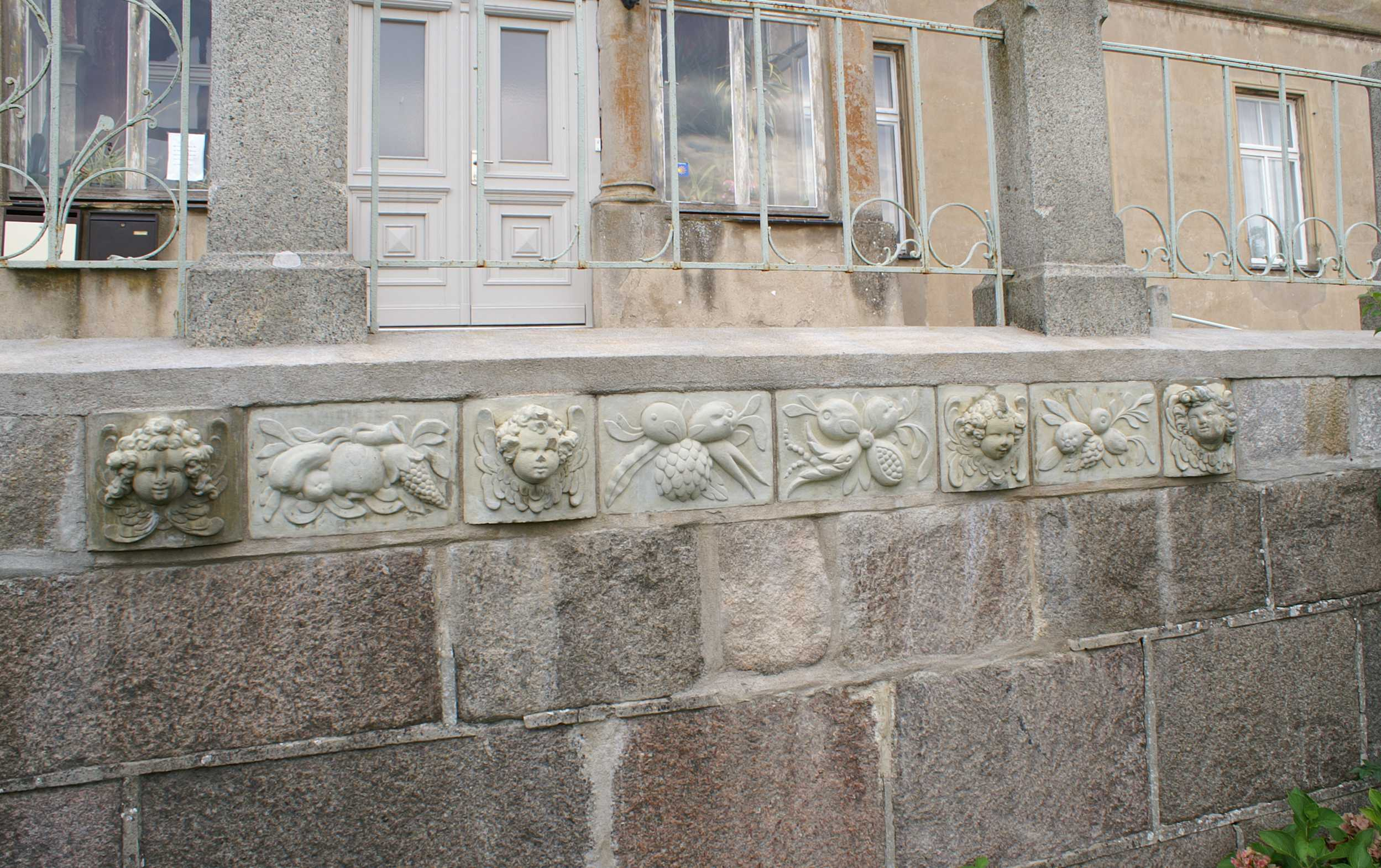 Wrangelsburg - Landkreis Ostvorpommern - Herrenhaus, Puttenköpfe in der Auffahrt